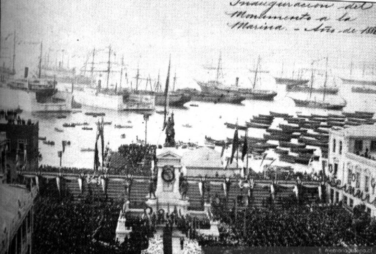 Inauguración del Monumento a la Marina, Valparaíso, 21 de Mayo de 1886 (Museo Naval y Marítimo. Archivo y Biblioteca Histórica de la Armada)